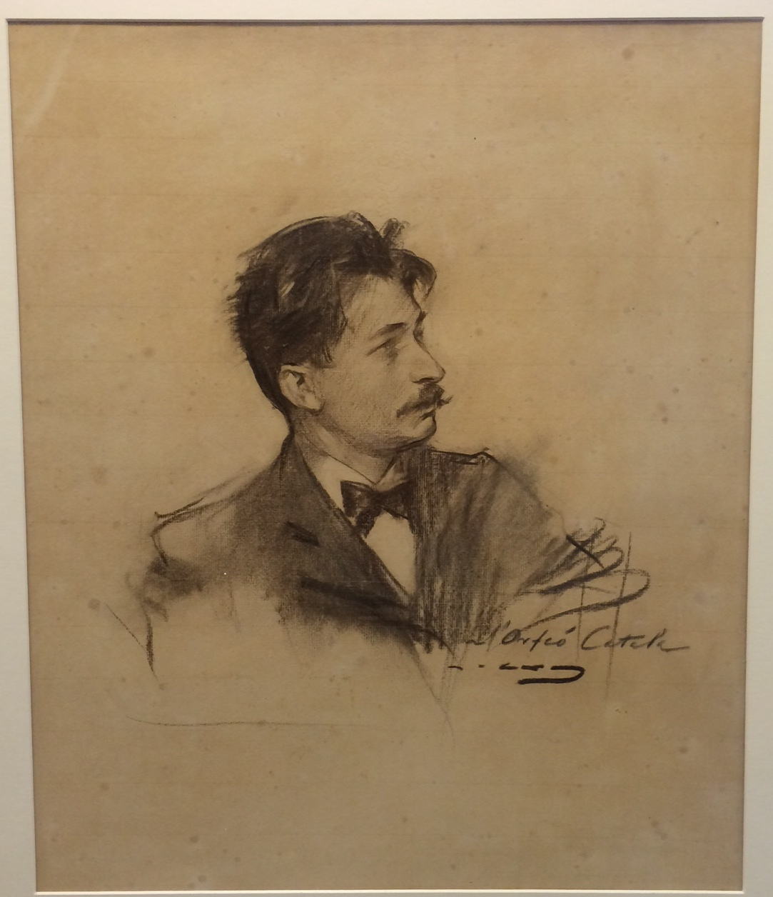 Retrat del Mestre Millet, conservat a la col·lecció Fundació Orfeó Català Palau de la Música Catalana